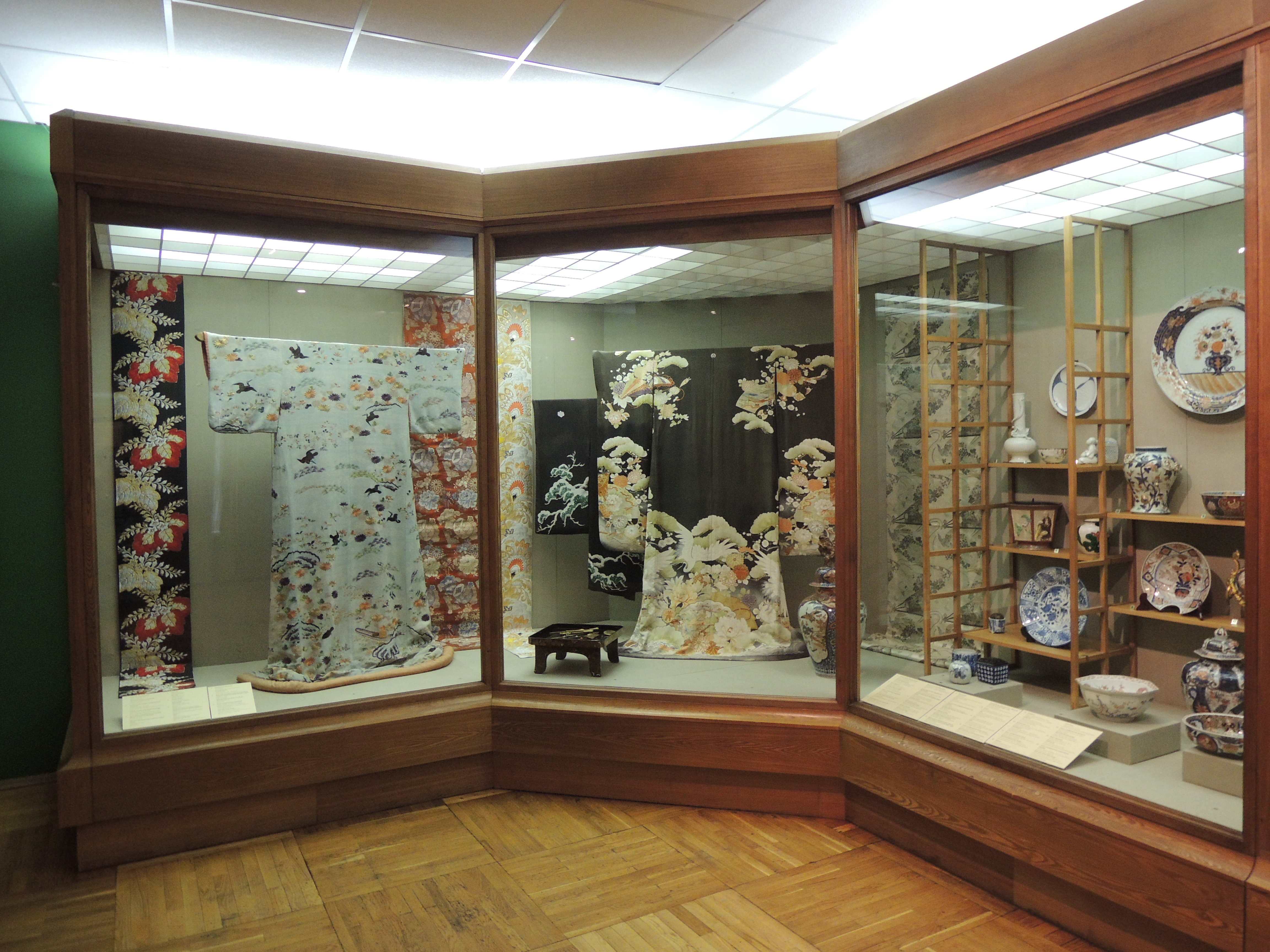 Государственный музей Востока (Москва)